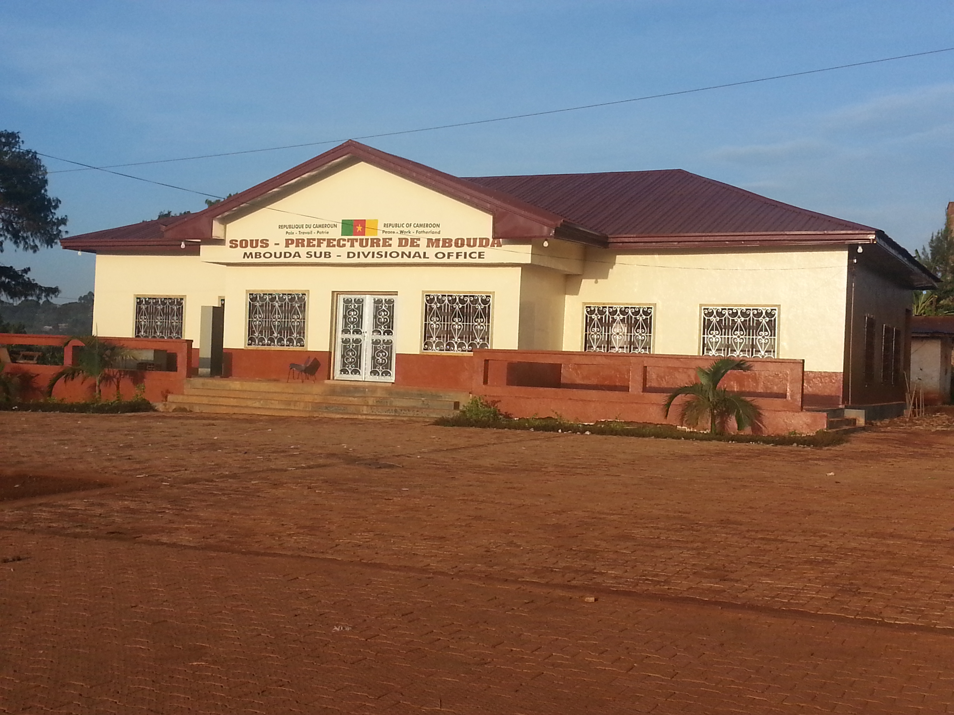 Sous-Préfecture de Mbouda réhabilité en 2015